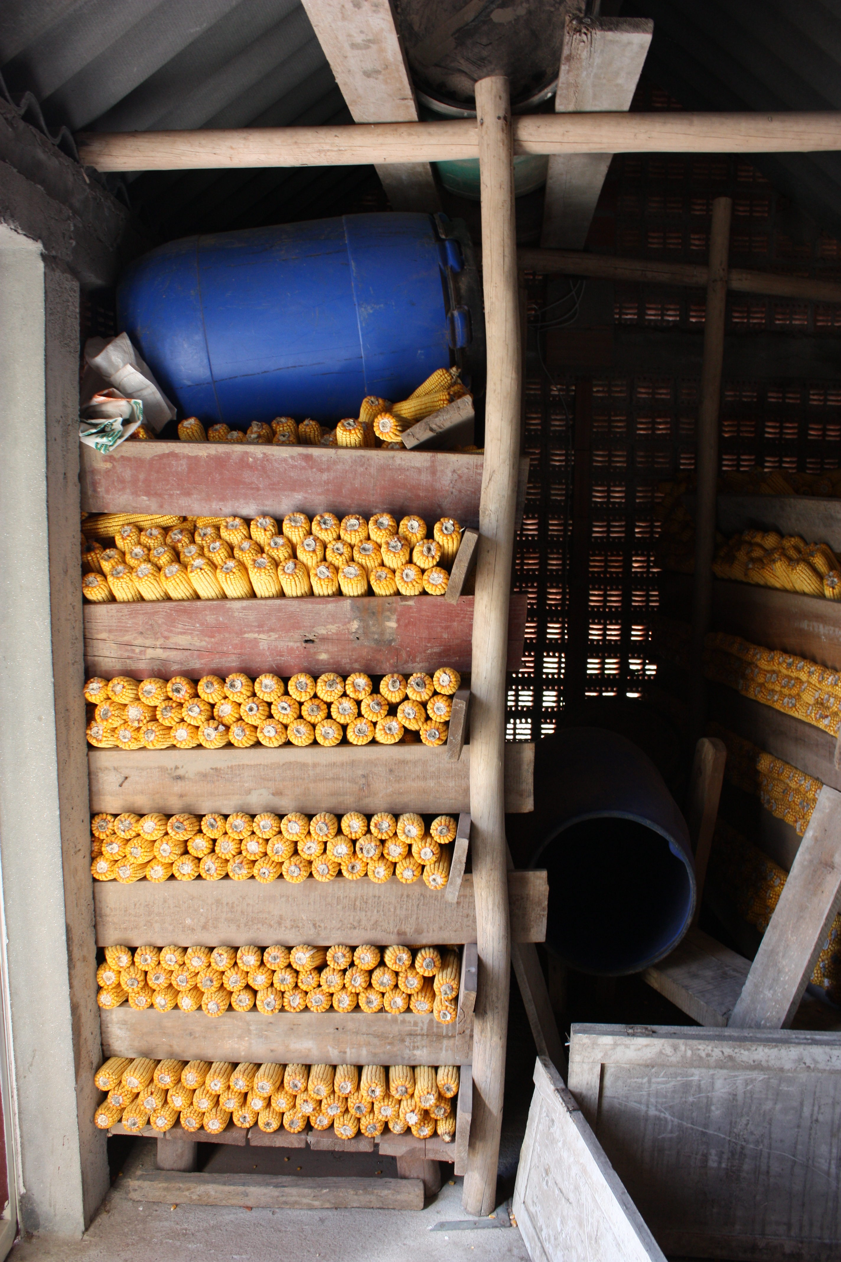 O millo, ao xeito, Boiro